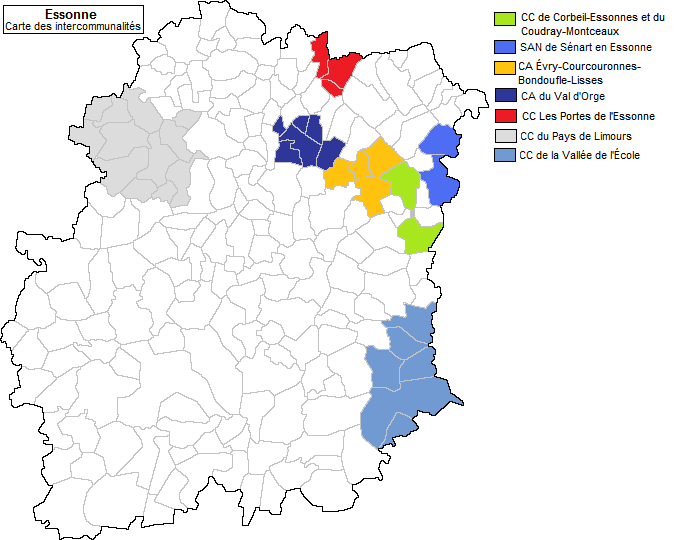 Carte des intercommunalités en Essonne en 2001